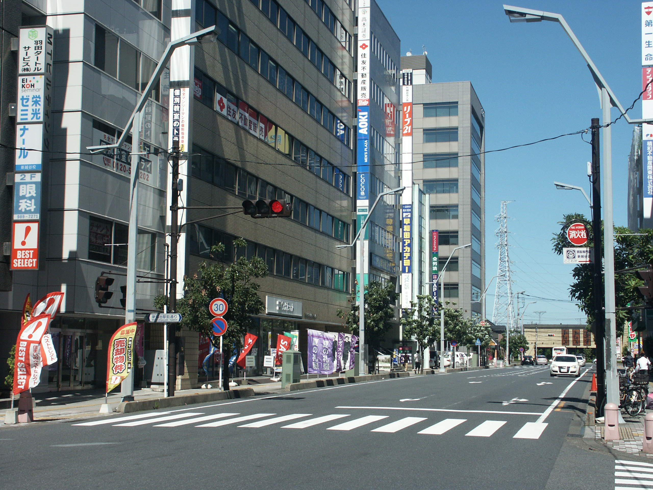 埼玉県越谷市にある新越谷駅前通り